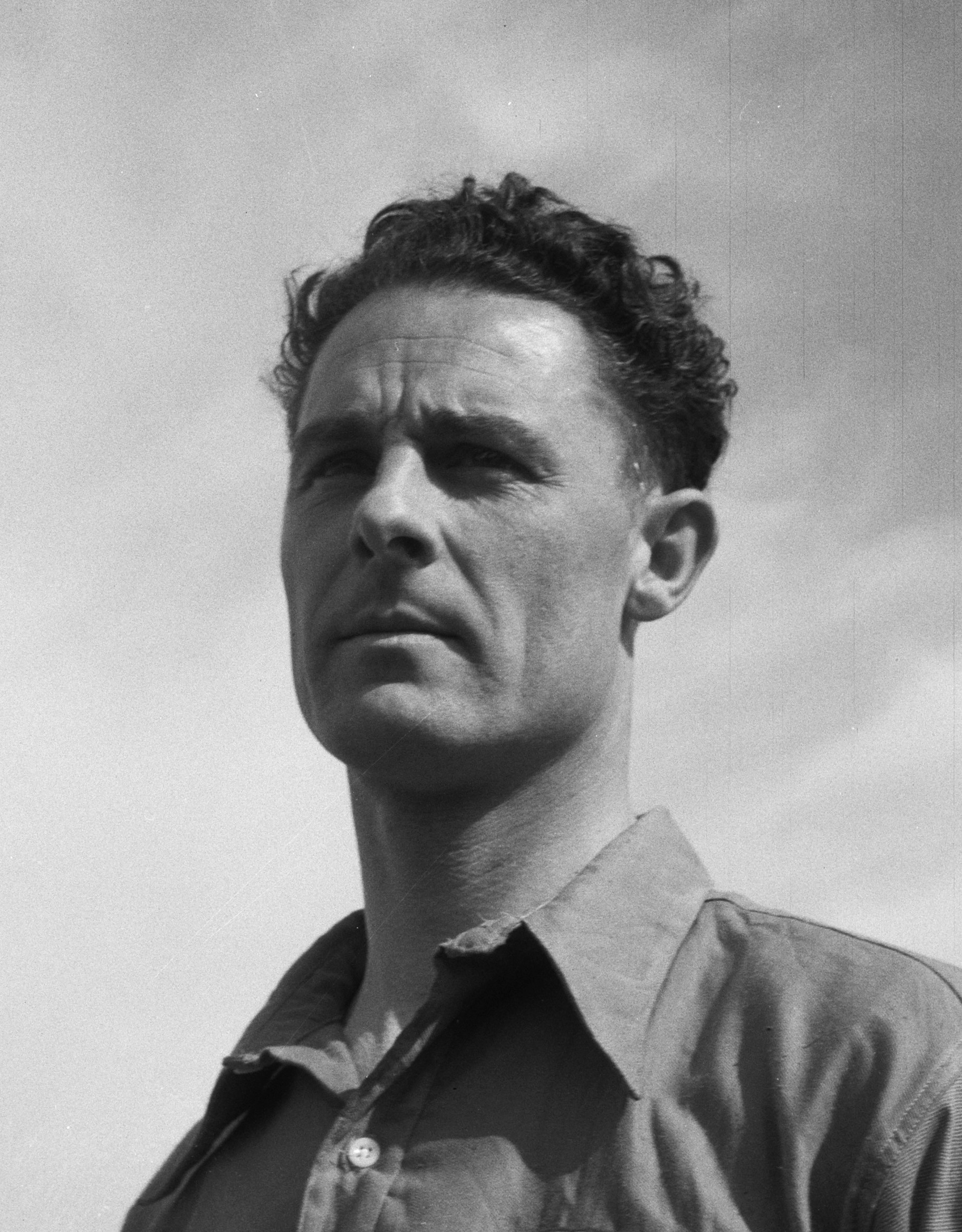 Hockey Derks